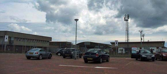 Anglesey Airport, Anglesey, Wales